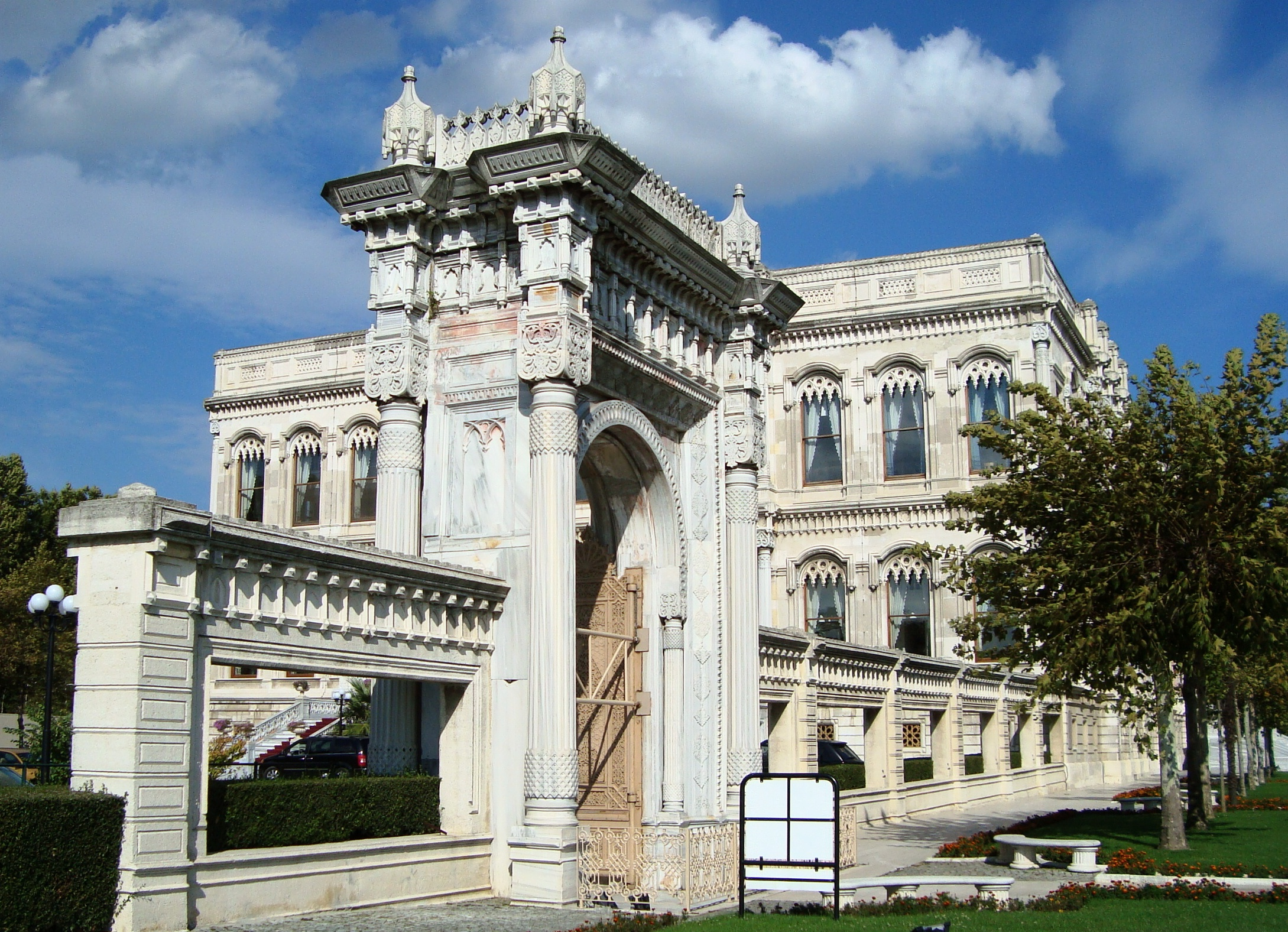 istanbul-çırağan palace-bosphour